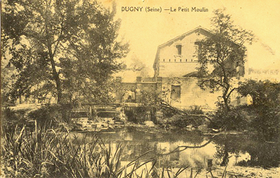 Dugny - l'ancien moulin